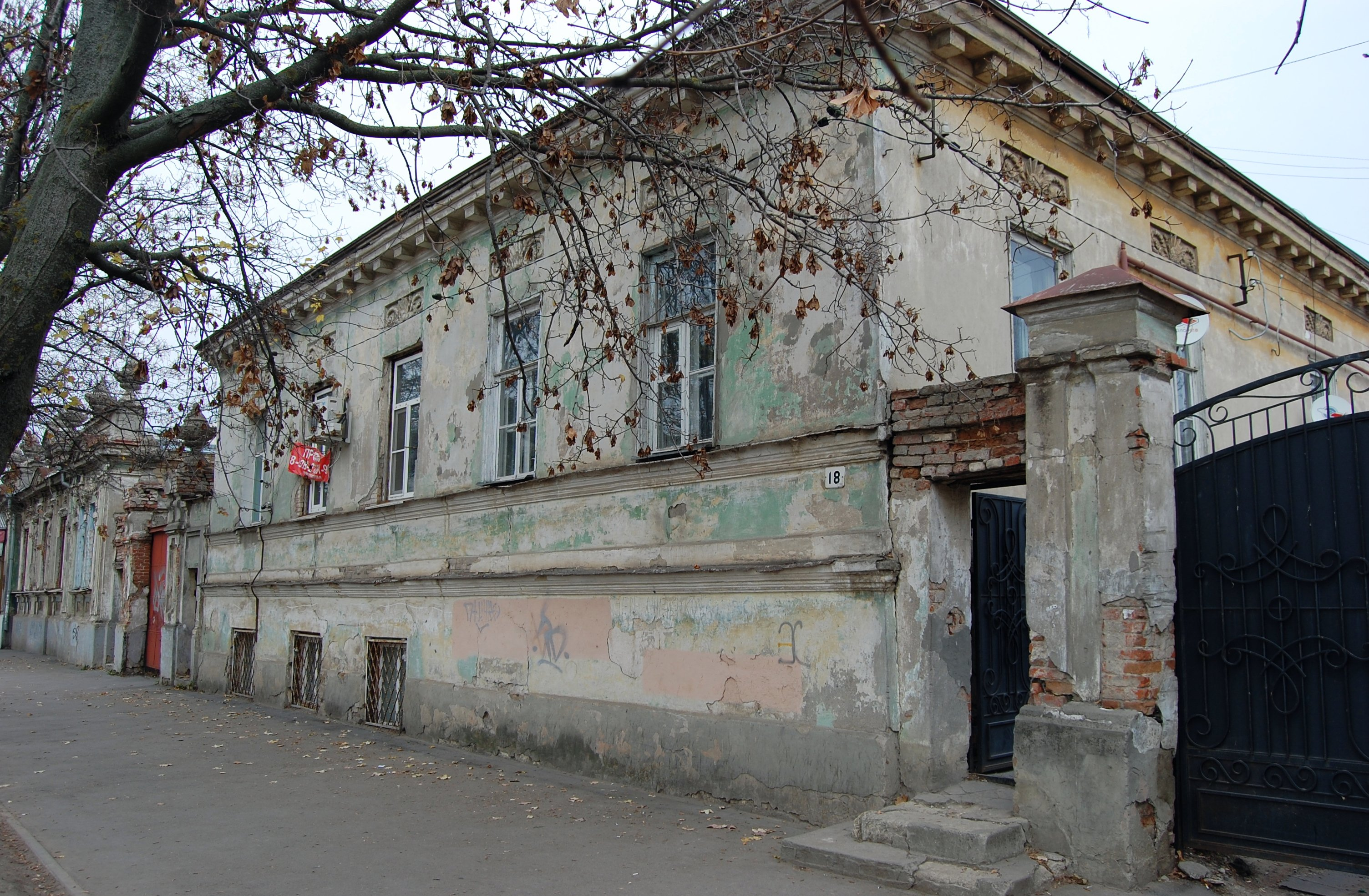 Фасад особняка "Дом Караспасова". Таганрог, ул. Фрунзе 18